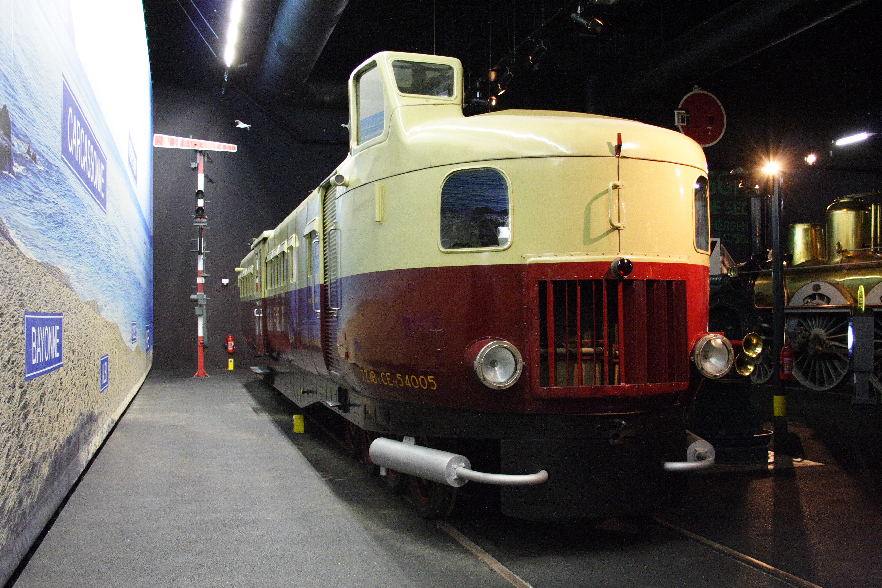 an autorail Micheline at Cité du Train de Mulhouse(Mulhouse, France)